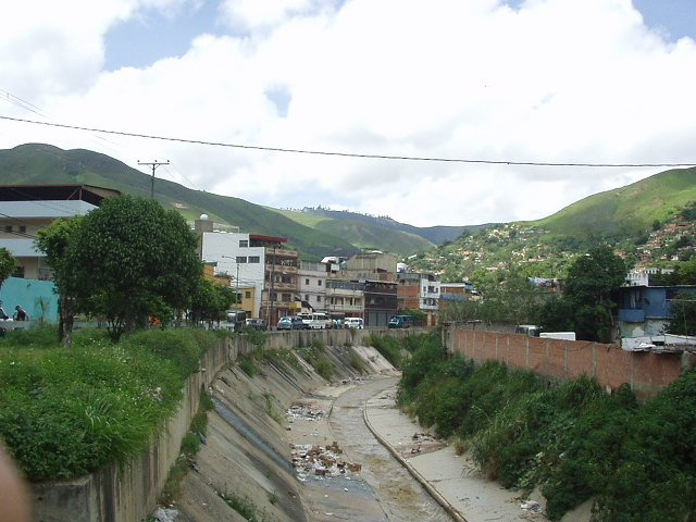 San Pedro River. Caracas, Venezuela.